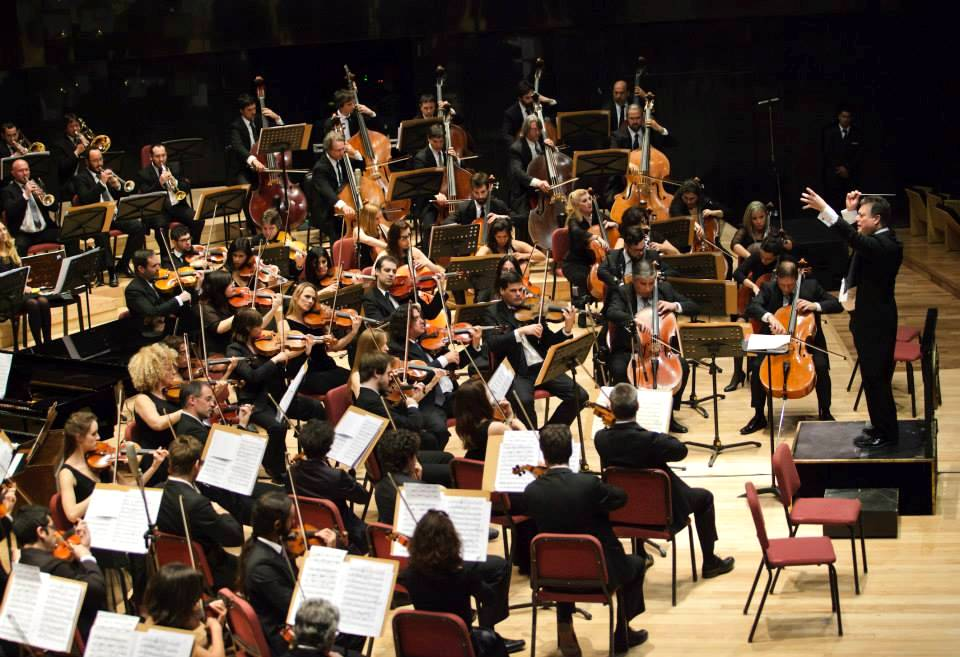 Orquesta Estable de La Plata en concierto en el Centro Cultural Néstor Kirchner